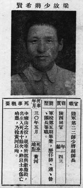 中文（台灣）: 抗戰軍人忠烈錄第一輯中的烈士遺像